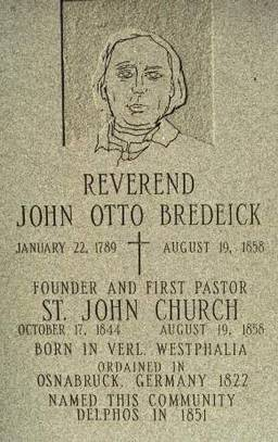 Fotografie des Grabsteins des Verler Bürgers Johannes Otto Bredeick. Er war der Gründer der Stadt Delphos (Ohio, USA).